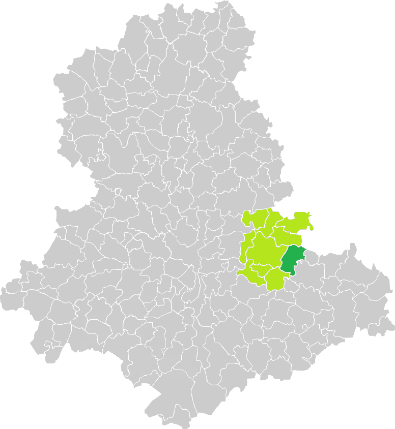 Carte de situation de la commune de Champnétery (en vert foncé) dans le votre Canton (en vert clair) sur une carte des communes de la Haute-Vienne